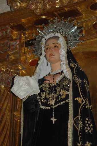 Virgen de la Soledad (Iglesia de Santa María de la Asunción), obra de Francisco Velasco Torre